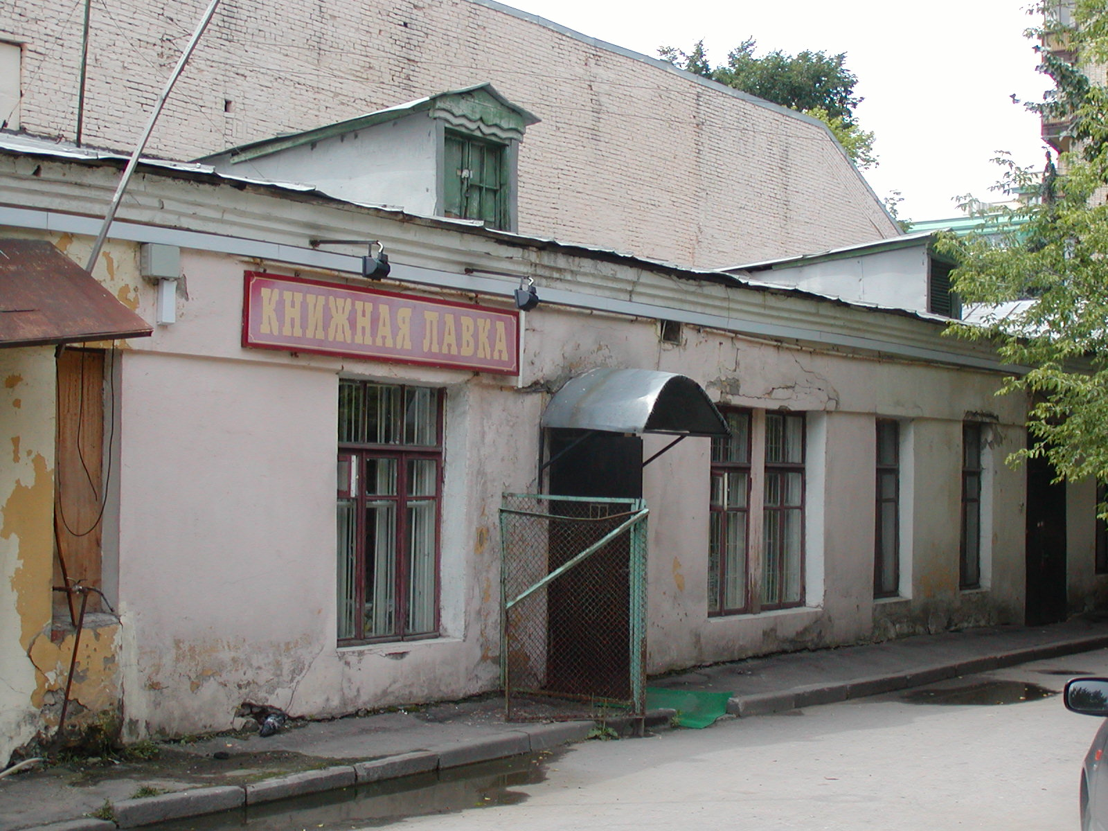 Книжная лавка Литературного института имени Горького.